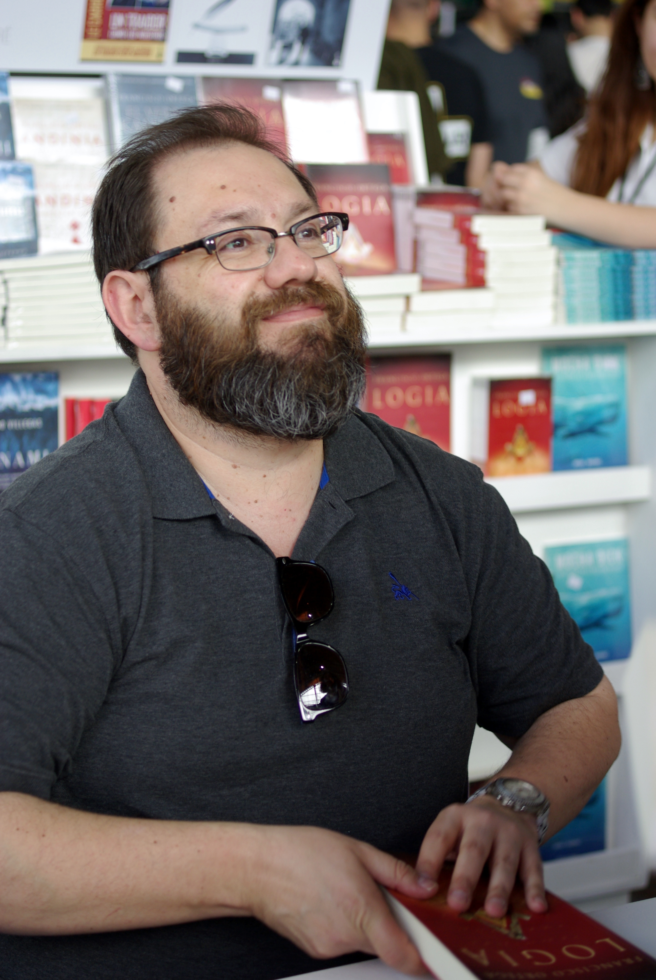 El escritor chileno Francisco Ortega firma libros en la Feria Internacional del Libro de Santiago 2016